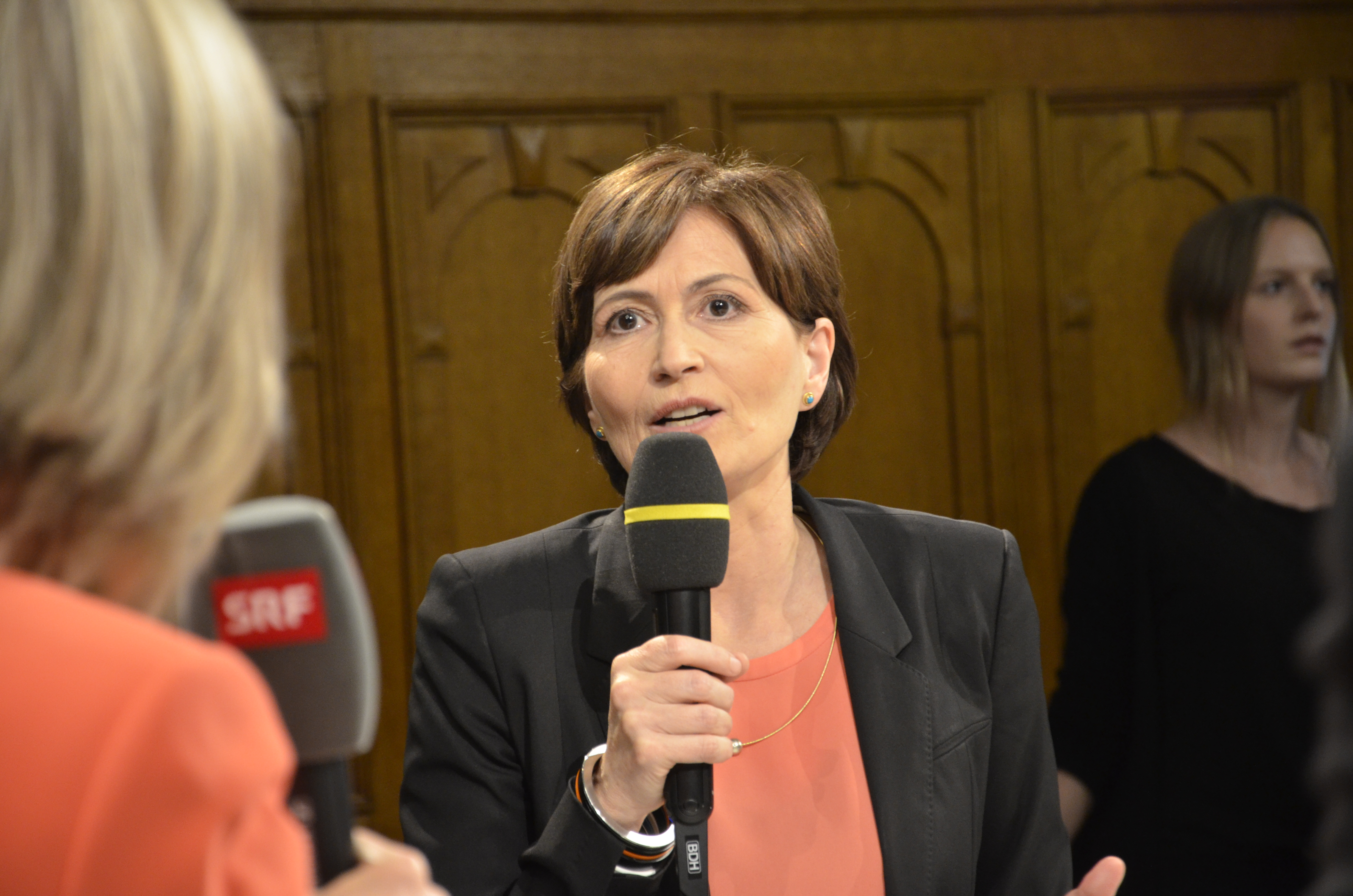 Schweizer Parlamentswahlen 2019: TV-Gespräch mit Regula Rytz im Bundeshaus